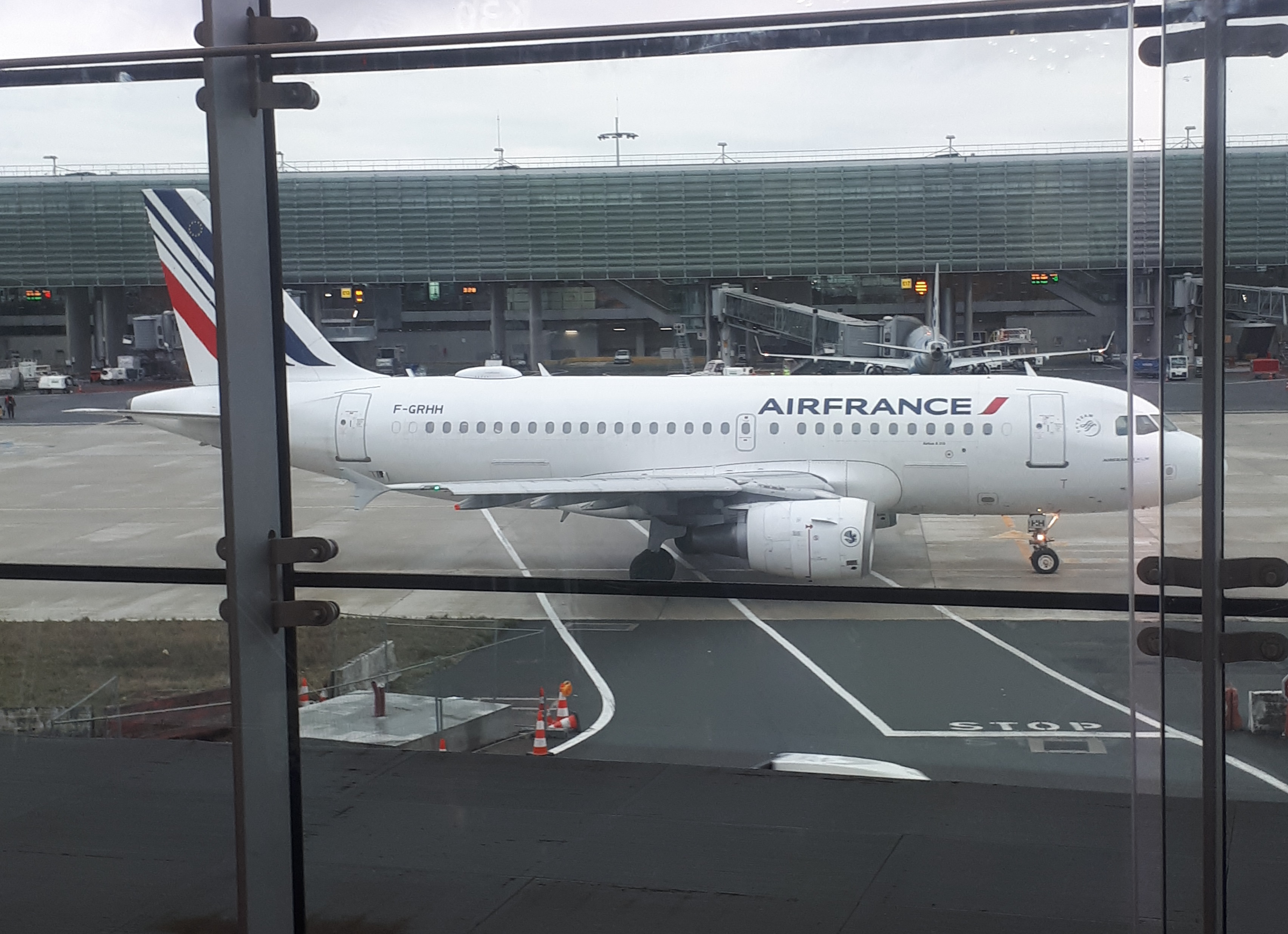 A319 Air France F-GRHH avec dome Wifi